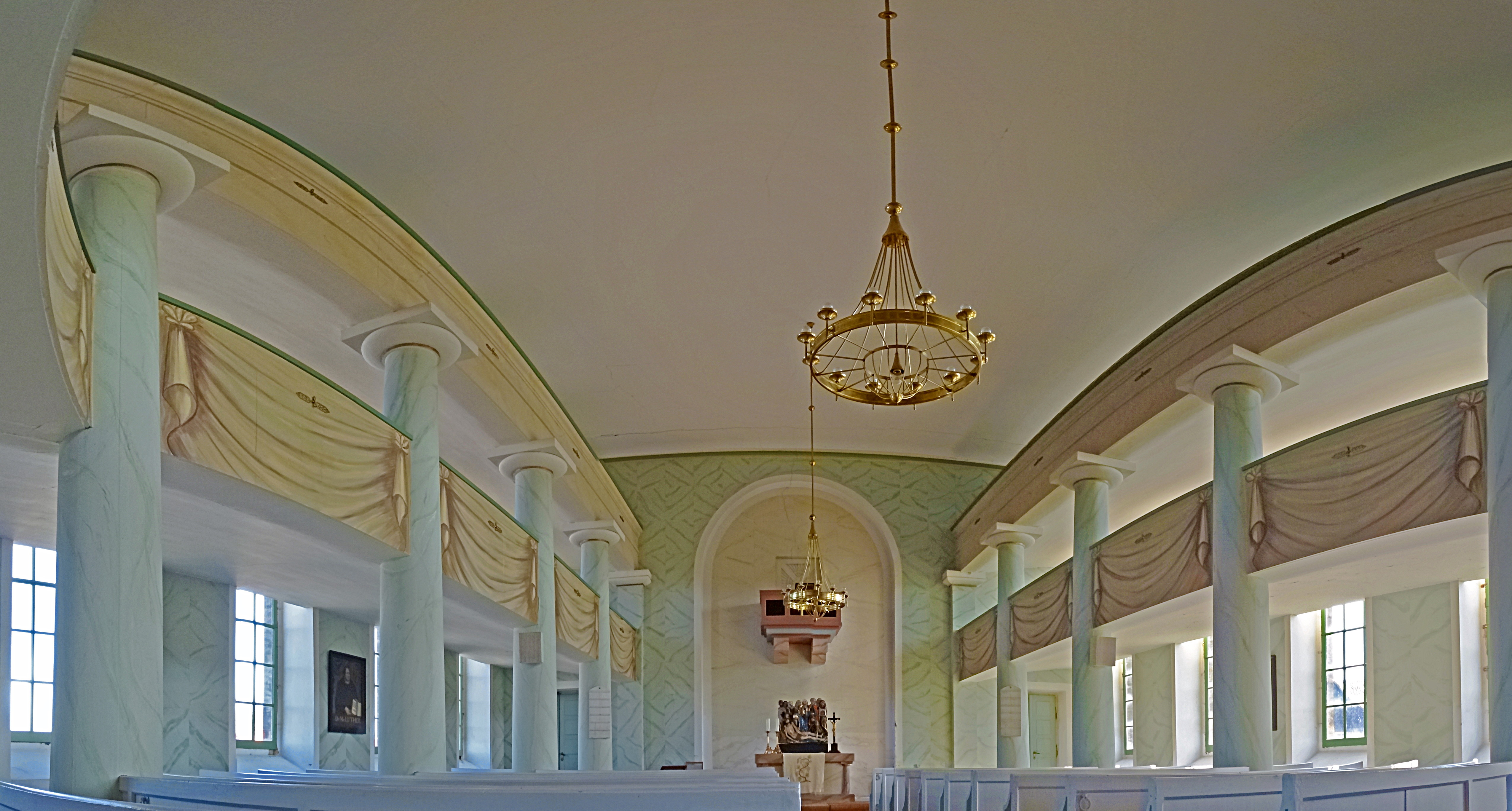 Innenraum Panorama der Kirche zu Gräfinau-Angstedt